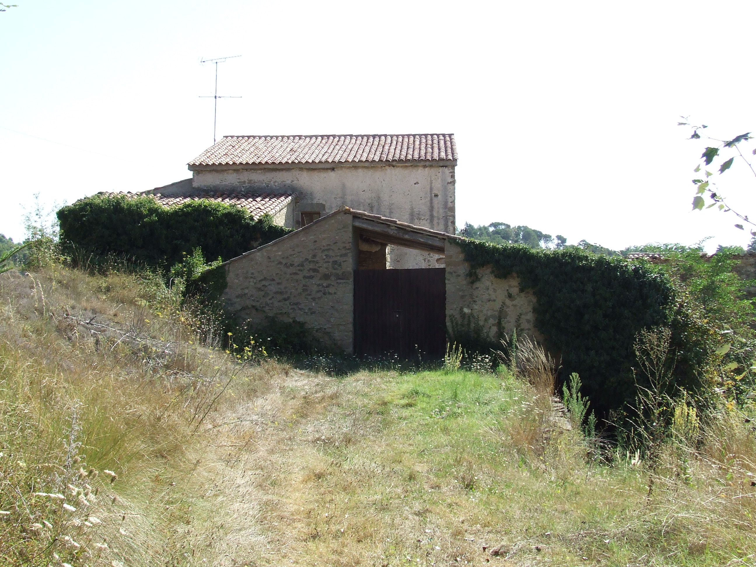 Can Sants (Castellcir, Moianès)